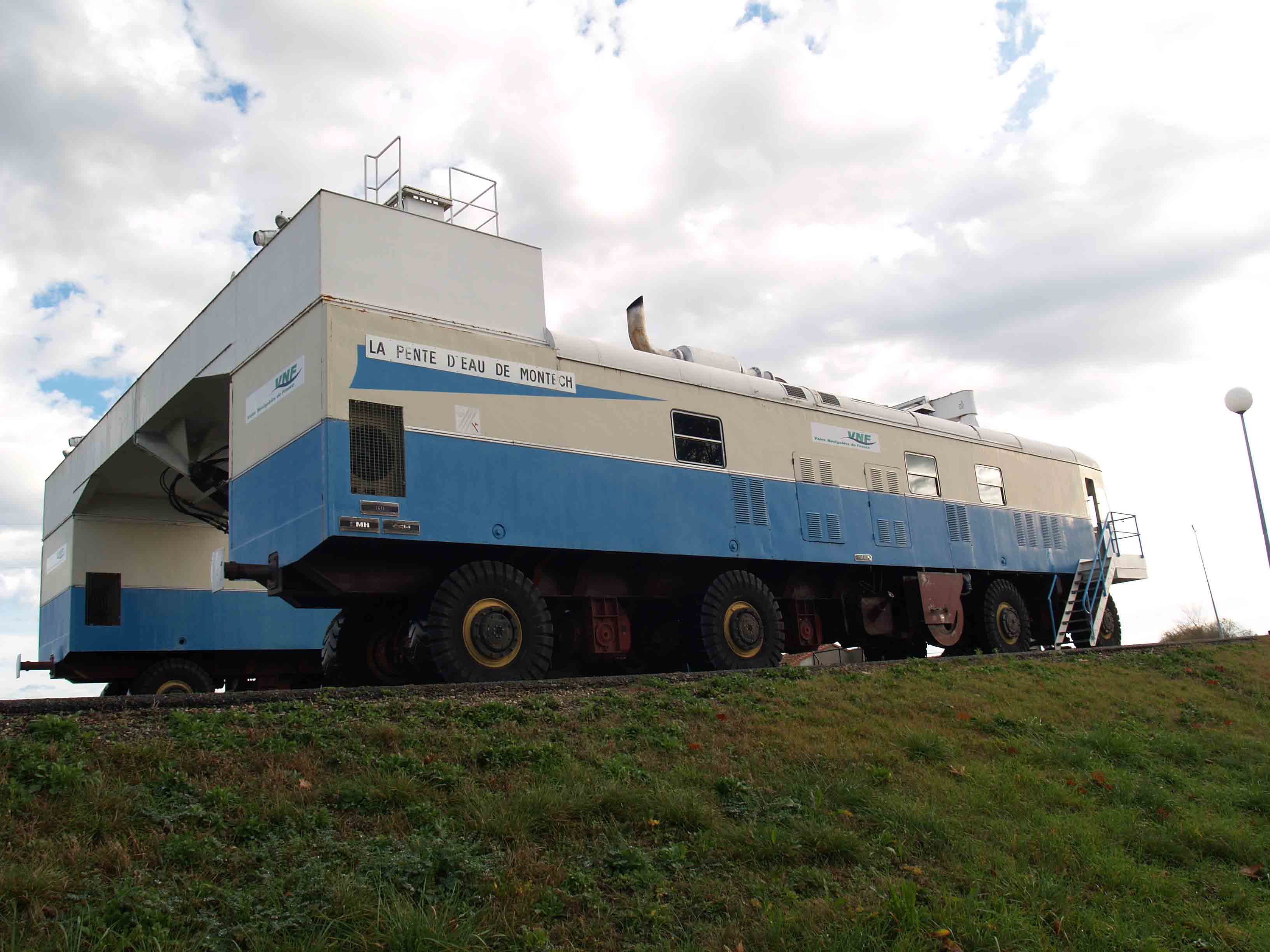 Pente d'eau de Montech Photo personnelle Bertrand Bouret